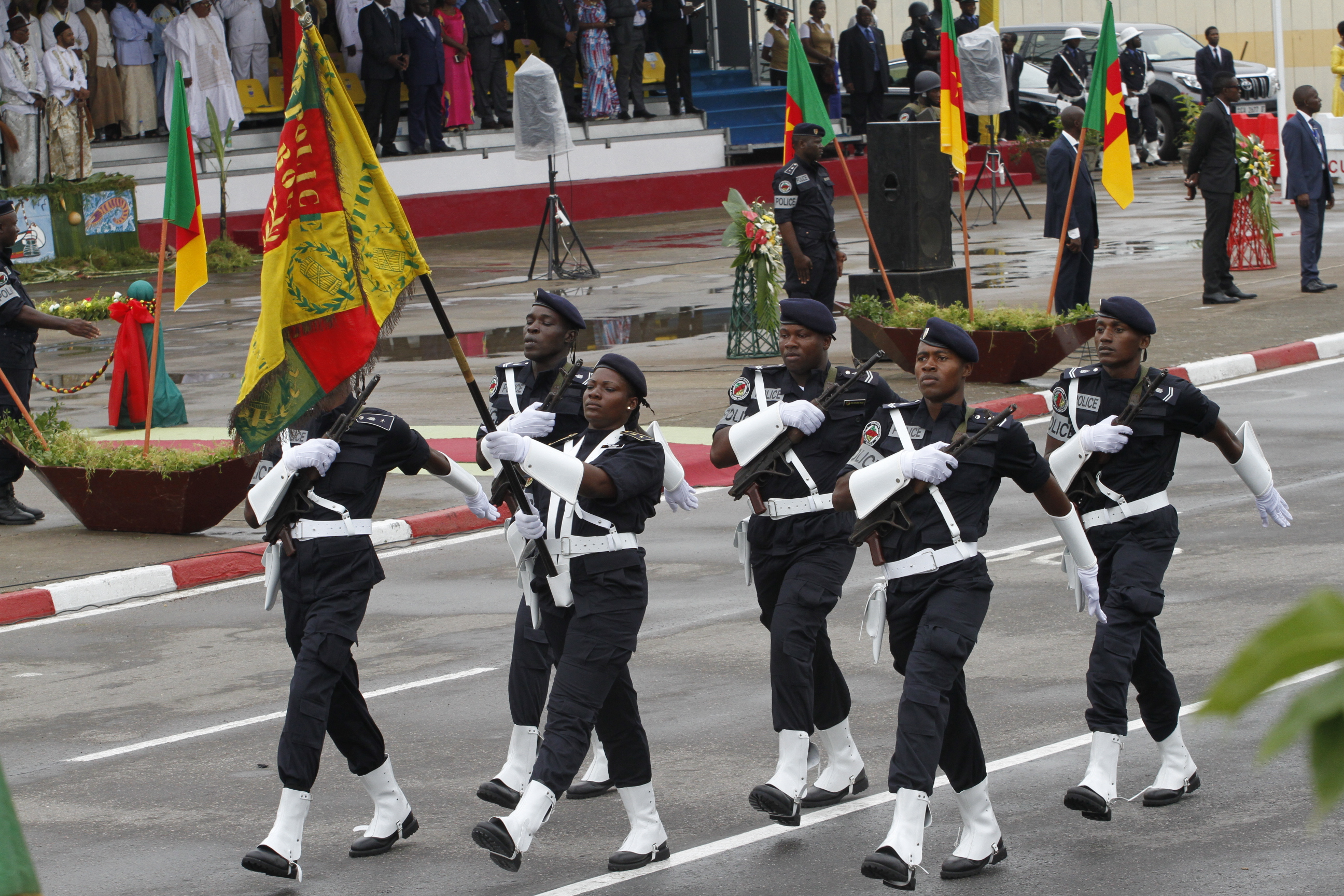 défilé de la police camerounaise lors de la fête nationale du Cameroun la 20 mai 2016 à Douala This is an image with the theme "Africa on the Move or Transport" from: Cameroon